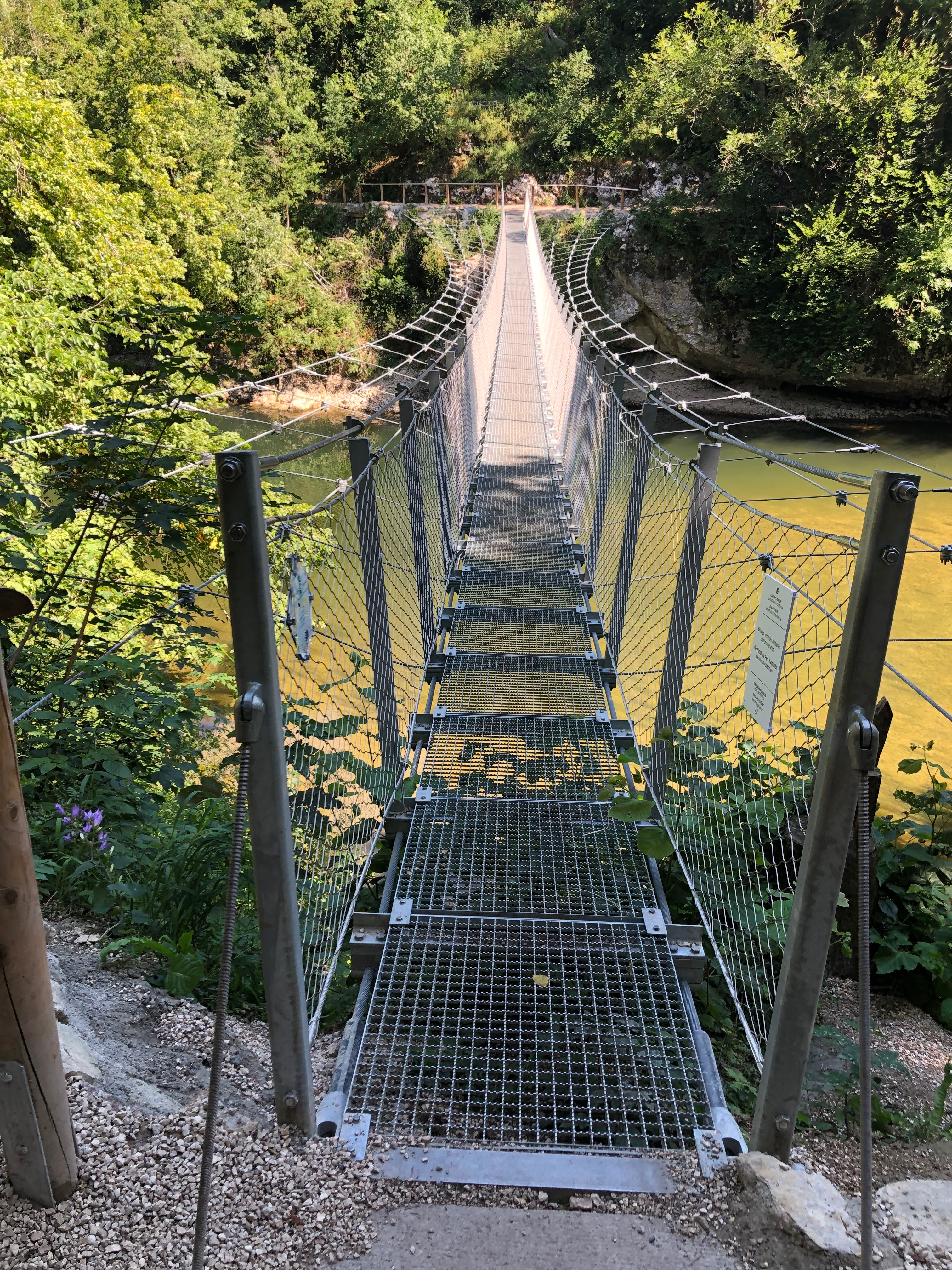 Hängebrücke im Fürstlicher Park Inzigkofen.